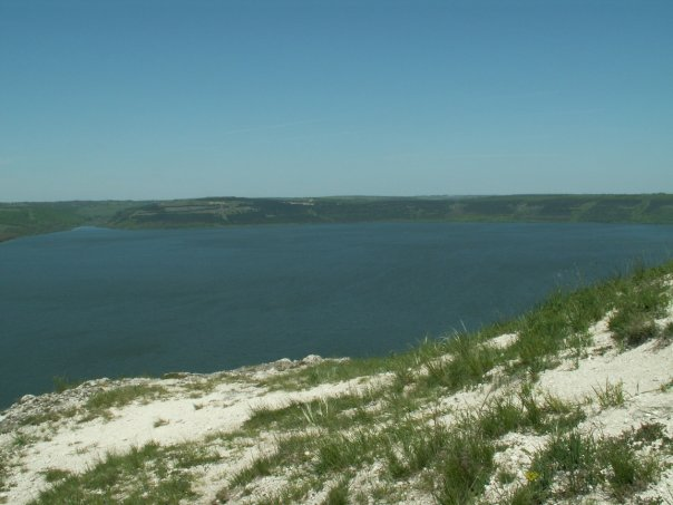 Bakota